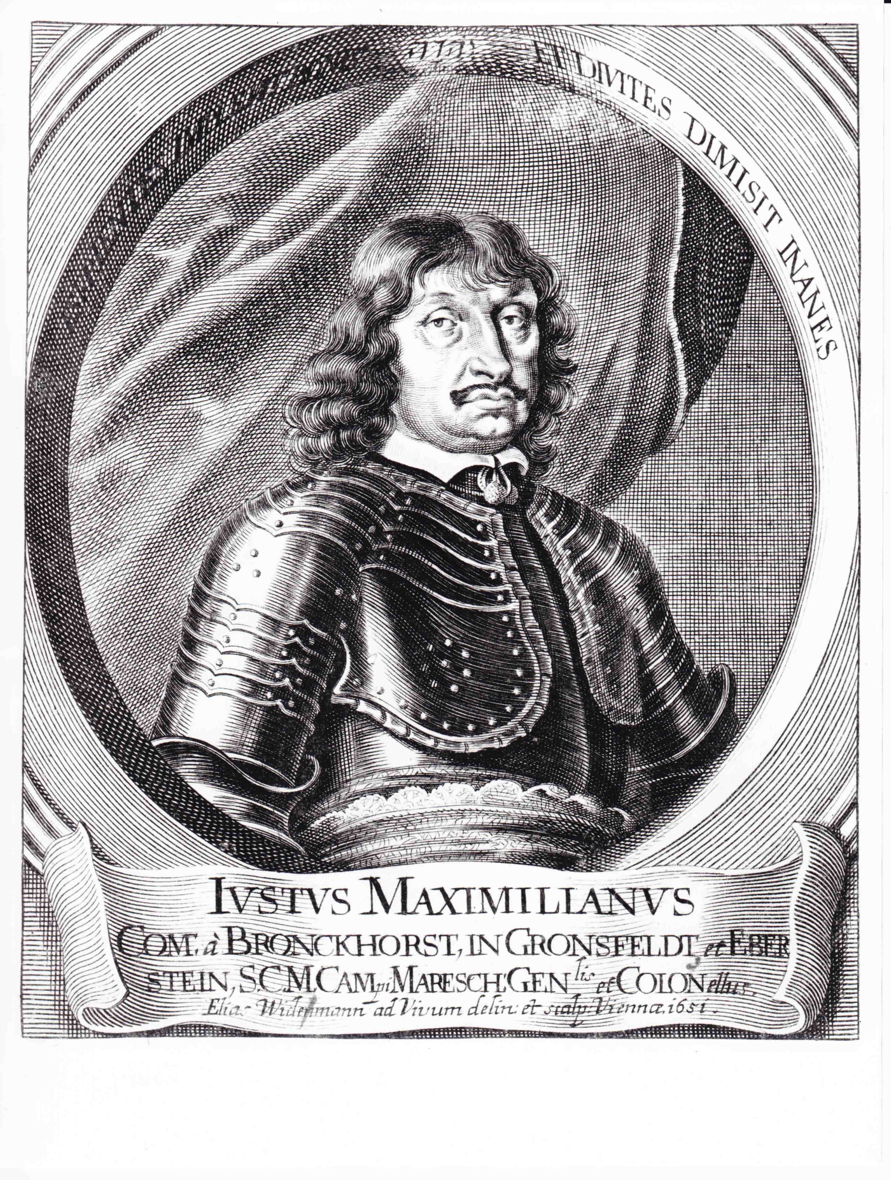 Kupferstich - Portrait des Jost Maximilian von Bronckhorst-Gronsfeld